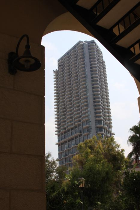 מבט מנווה צדק לסביבה המודרנית.